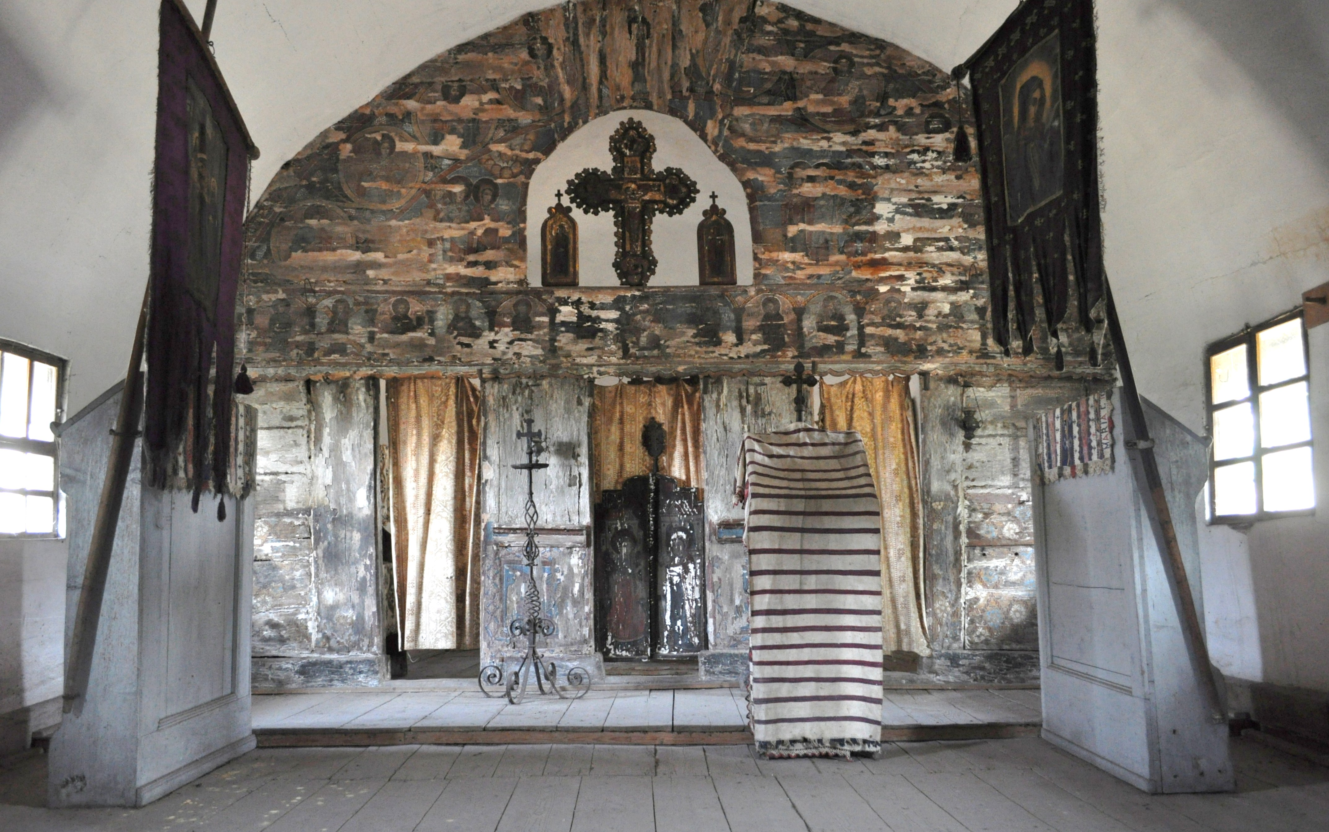 Biserica de lemn „Sfinții Arhangheli” din Săliștea, județul Alba